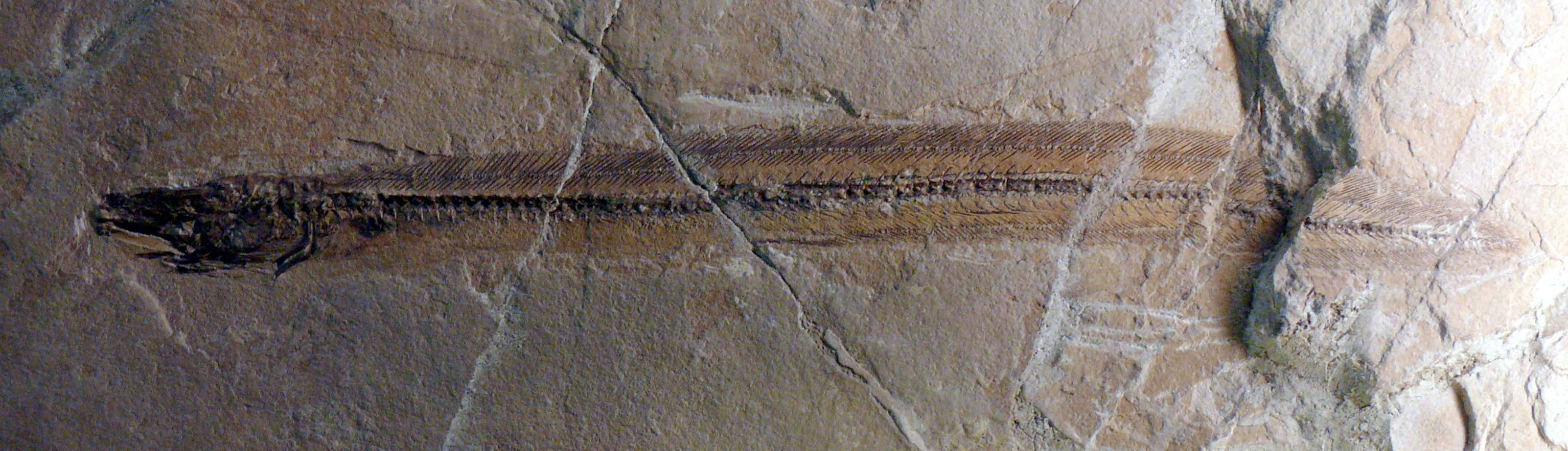 Paranguilla tigrina from Monte Bolca